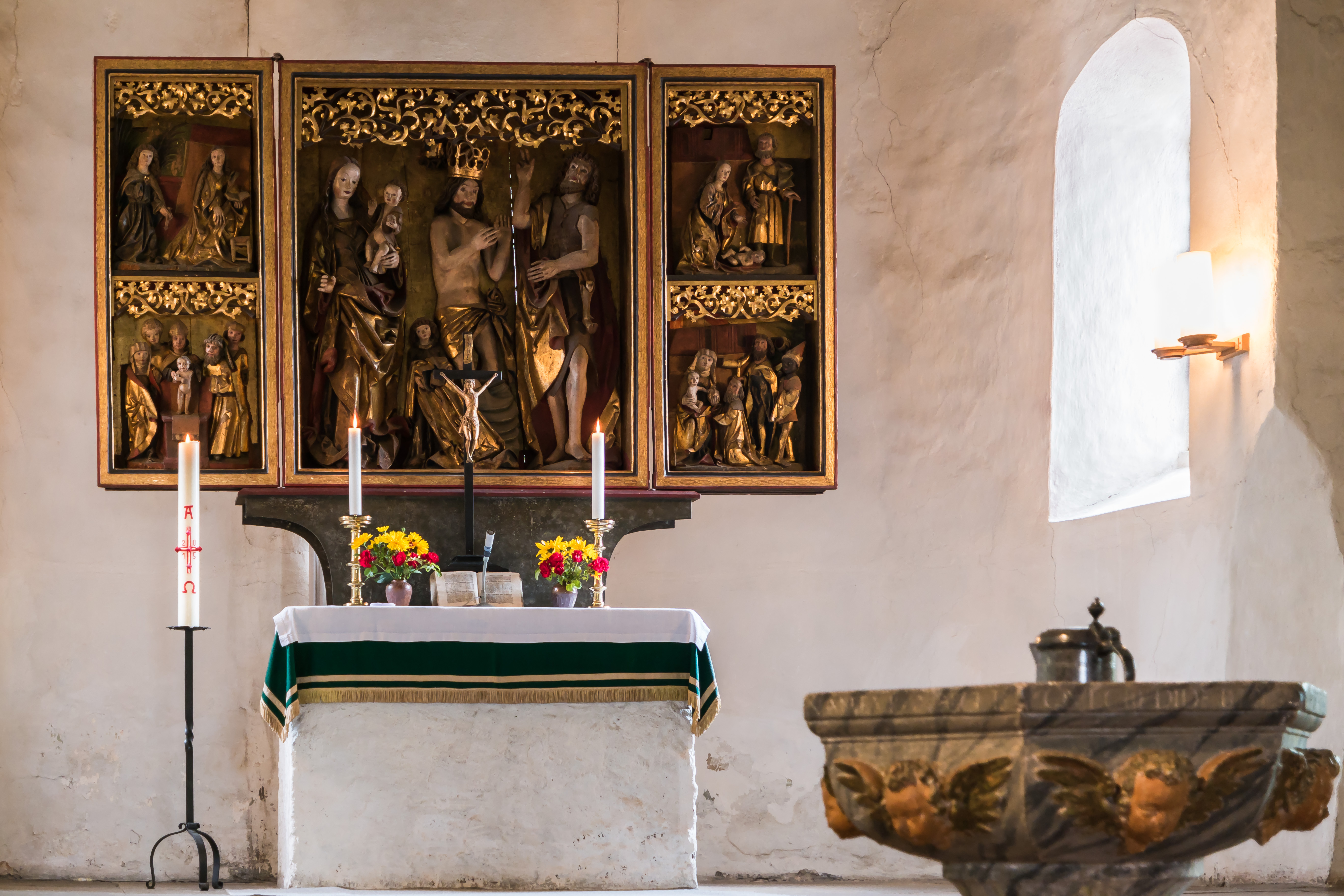 Altar der Stadtkirche St.Marien, Kirchberg 1 in Schildau